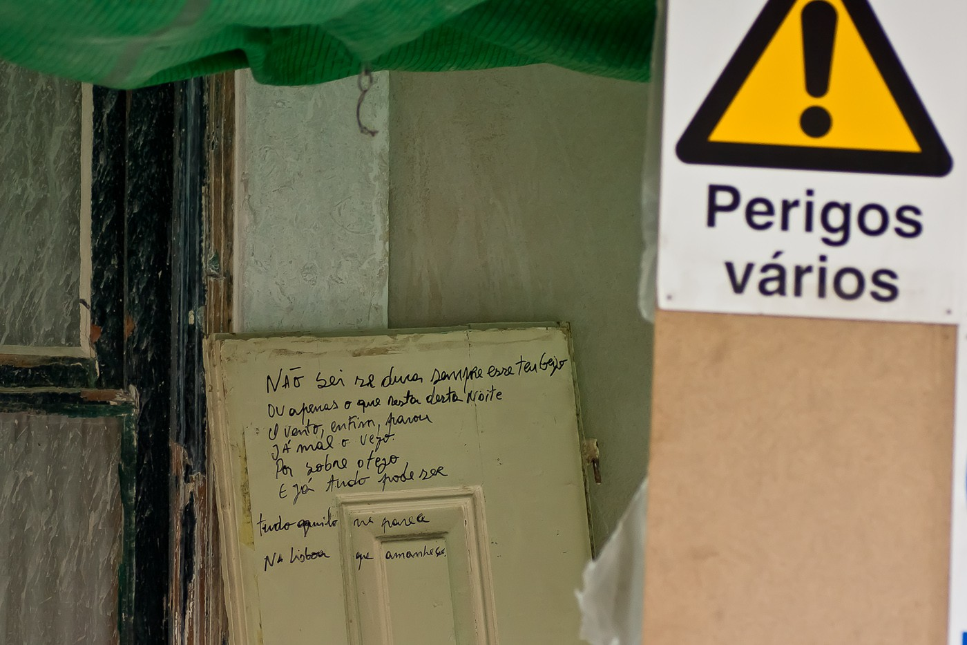 «Perigos vários»